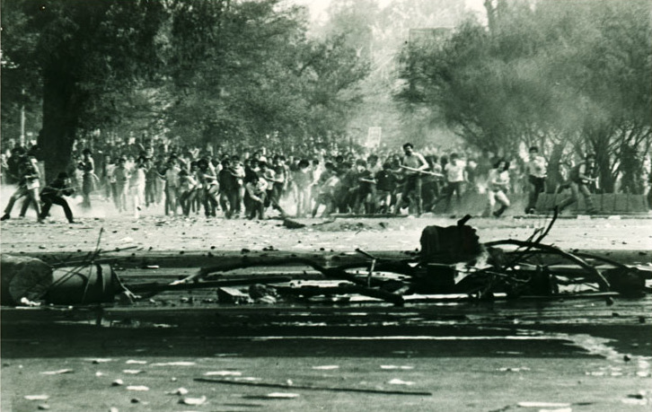 1 - 5 - 1984 Chile. Santiago. Parque O'Higgins. Elipse. Manifestación organizada por el Comando Nacional de Trabajadores - CNT. Segun el oficio conductor y en referencia se señala que las fotografías muestran "...desmanes provocados por elementos de izquierda -entre los que se incluyen activistas del MIR- en el transcurso y con posterioridad a la manifestación opositora organizada por el Comando Nacional de Trabajadores...".